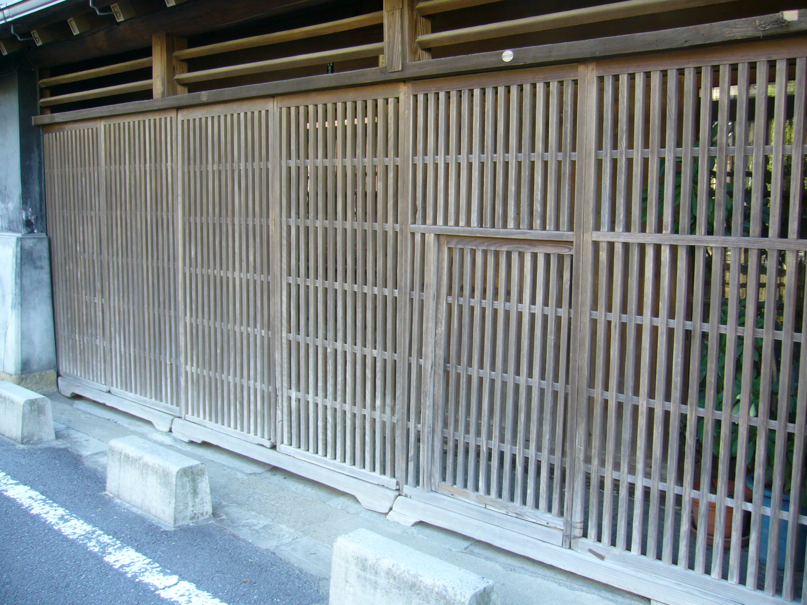 lattice-door,koushi-do,katori-city,japan